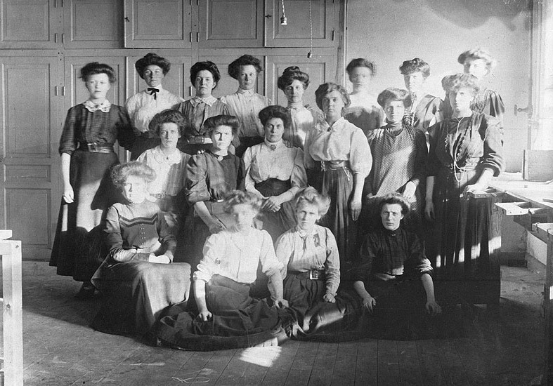 LM Ericssons personal vid fabriken på Tulegatan